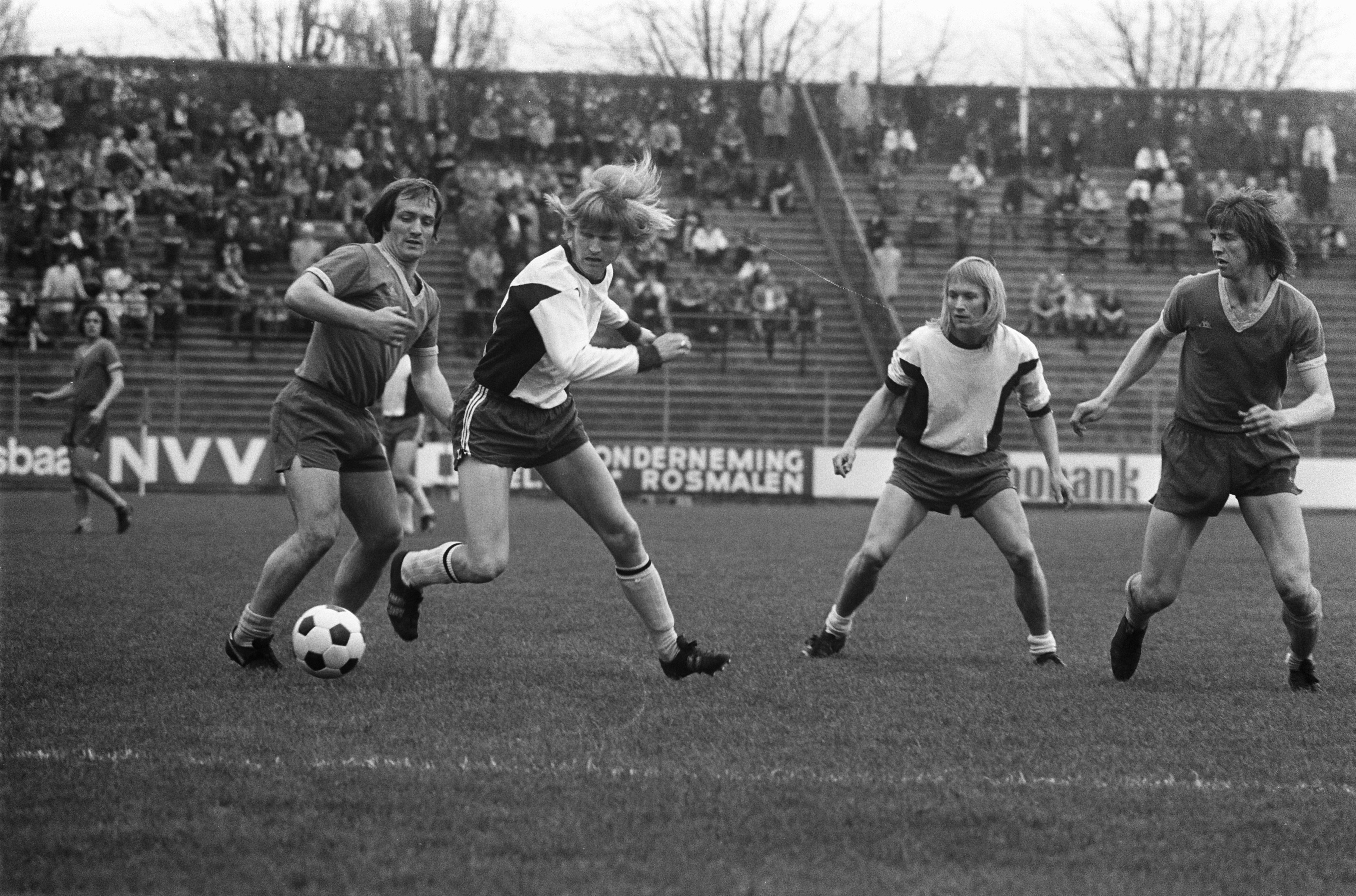 Collectie / Archief : Fotocollectie Anefo Reportage / Serie : [ onbekend ] Beschrijving : FC Den Bosch - FC Den Haag. 2-1. spelmomenten Annotatie : Dick Advocaat (links) in duel met een Den Bosch speler Datum : 6 mei 1973 Locatie : 's-Hertogenbosch Trefwoorden : sport, voetbal Instellingsnaam : AJAX, Sparta Fotograaf : Peters, Hans / Anefo Auteursrechthebbende : Nationaal Archief Materiaalsoort : Negatief (zwart/wit) Nummer archiefinventaris : bekijk toegang 2.24.01.05 Bestanddeelnummer : 926-3918